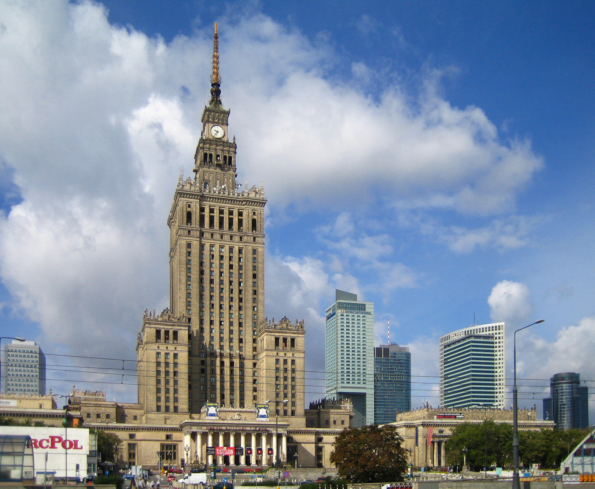 Pałac Kultury i Nauki w Warszawie.